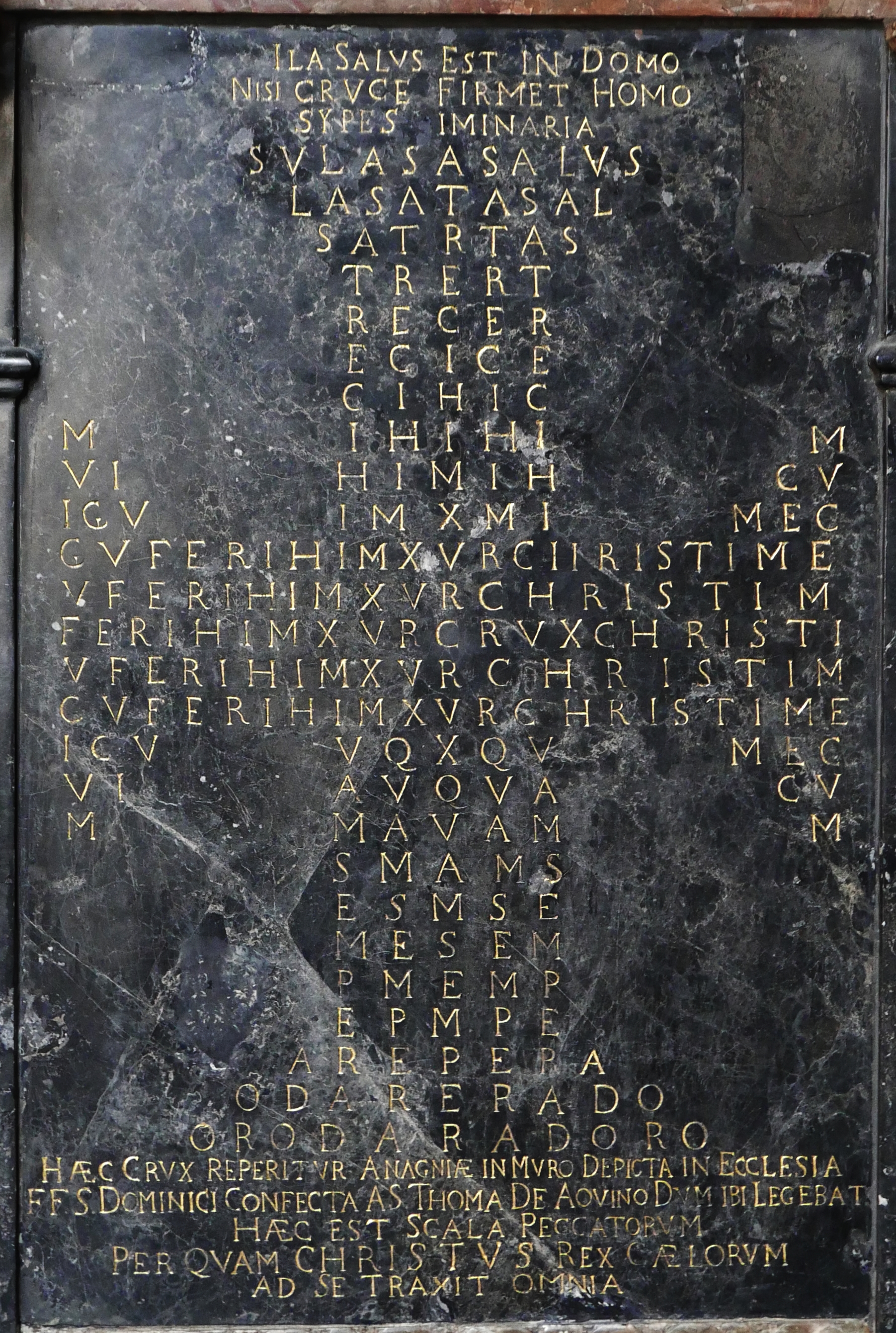 Krzyż św. Tomasza z Akwinu - krużganki przy klasztorze dominikanów w Krakowie. Crux mihi certa salus - Krzyż, pewne zbawienie dla mnie Crux quam semper adoro - Krzyż zawsze przeze mnie adorowany Crux domini mecum - Krzyż Pana niech będzie ze mną Crux mihi refugium - Krzyż moim schronieniem.